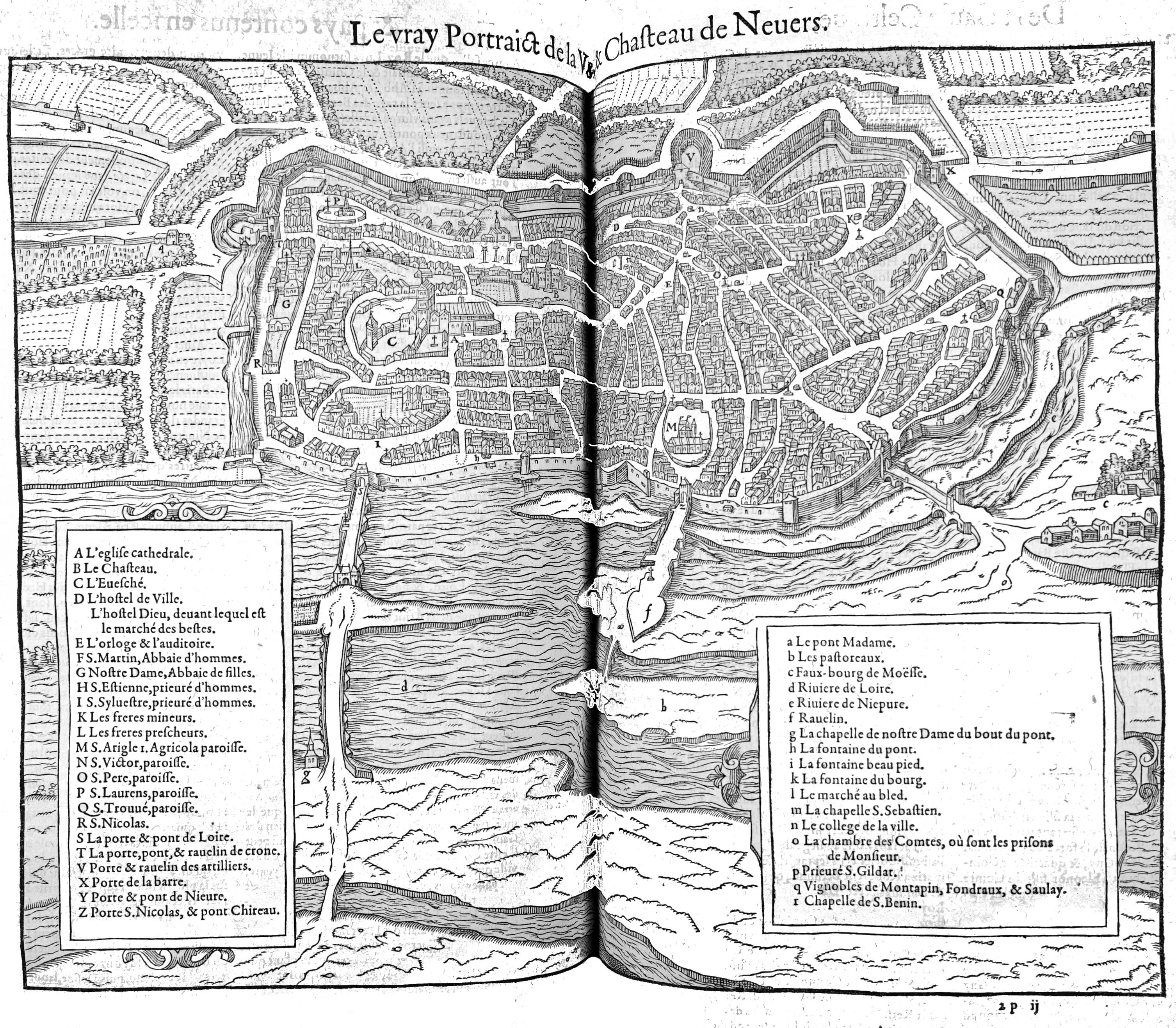 extrait du livre "Cosmographie universelle "de Belleforest.